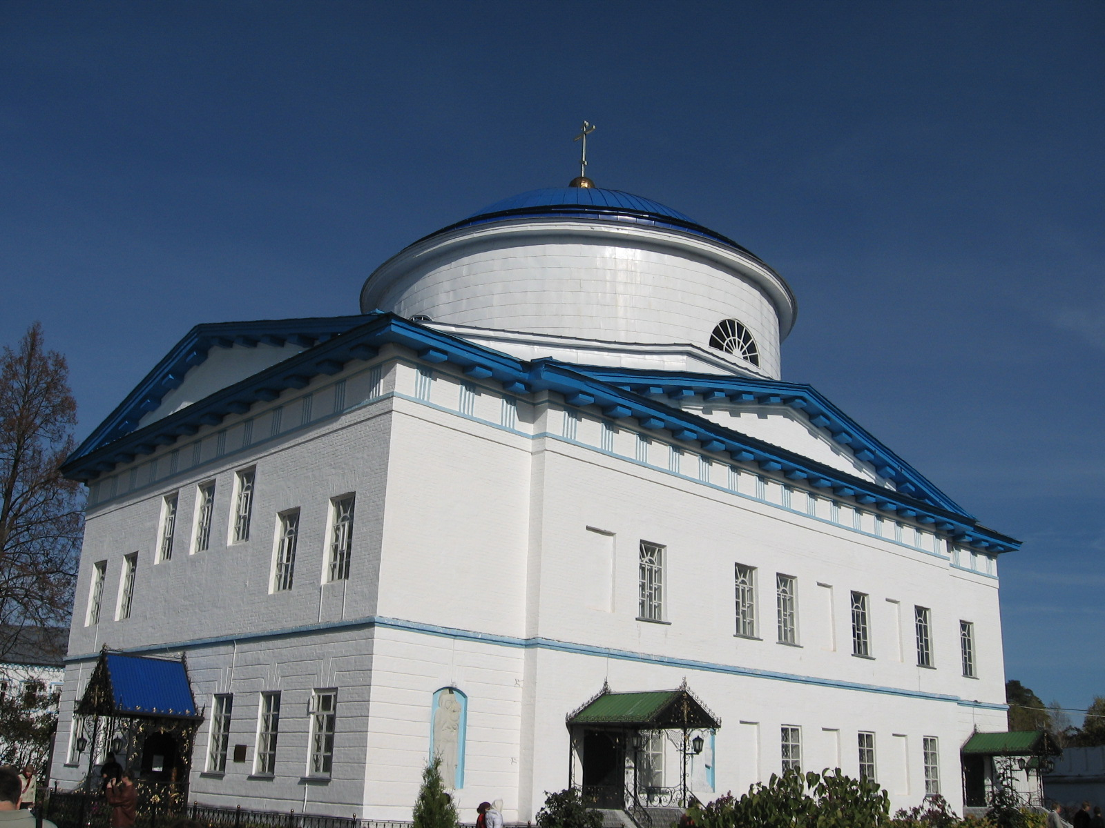 Собор Грузинской иконы Божией Матери